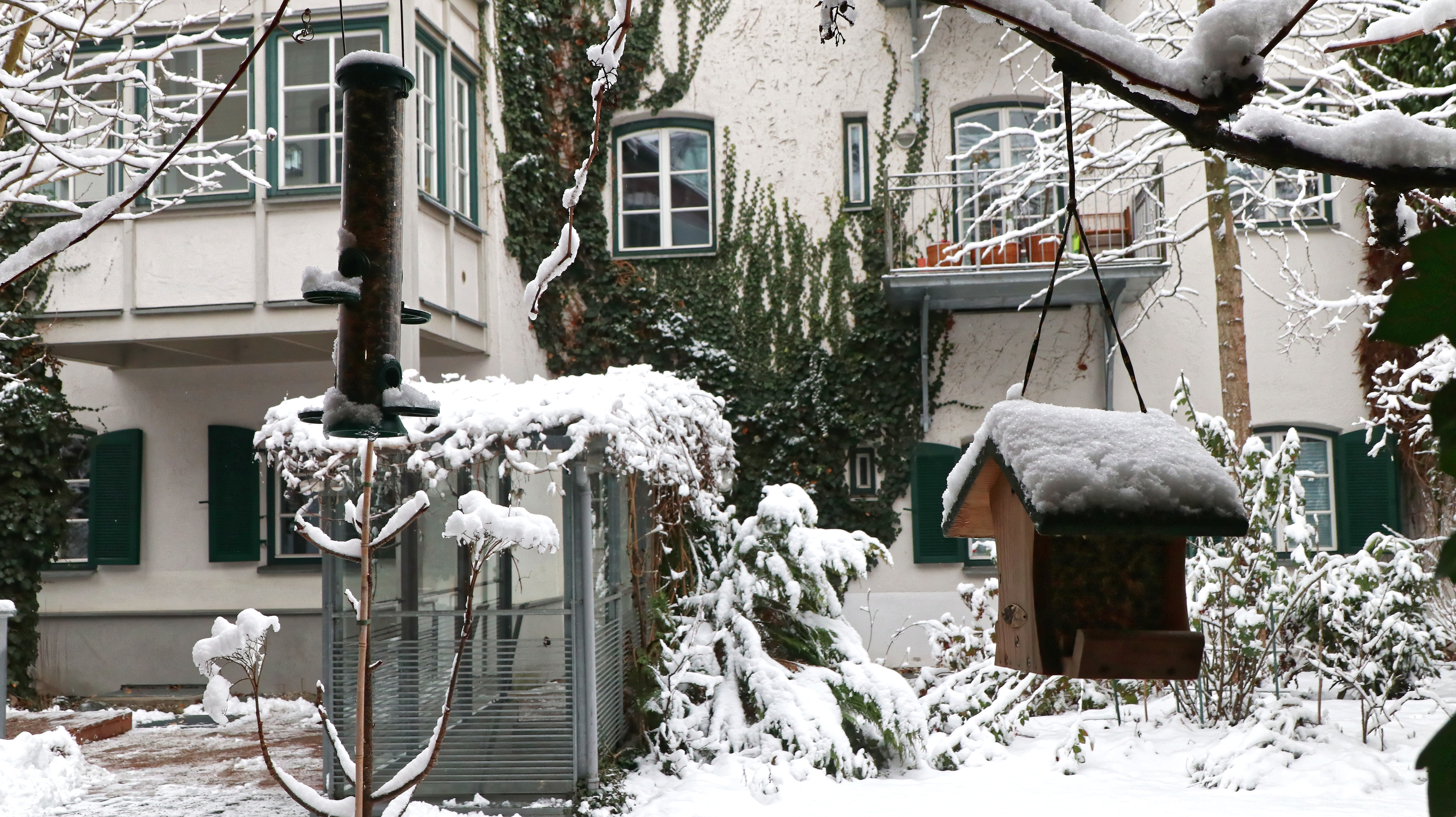 Blick in den Innenhof bei Schnee